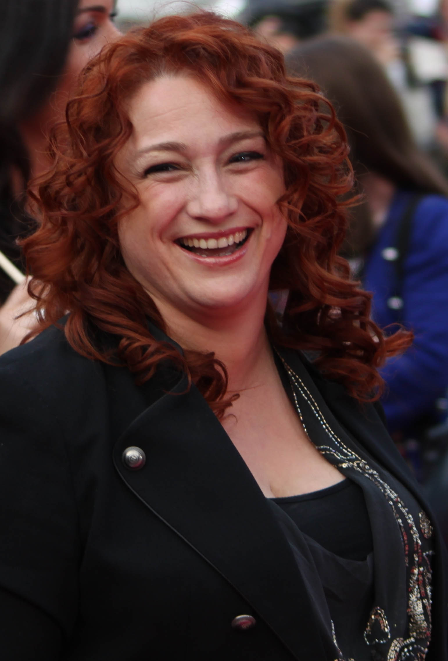 Foto: Vincent Hasselgård, Aktiv I Oslo.no